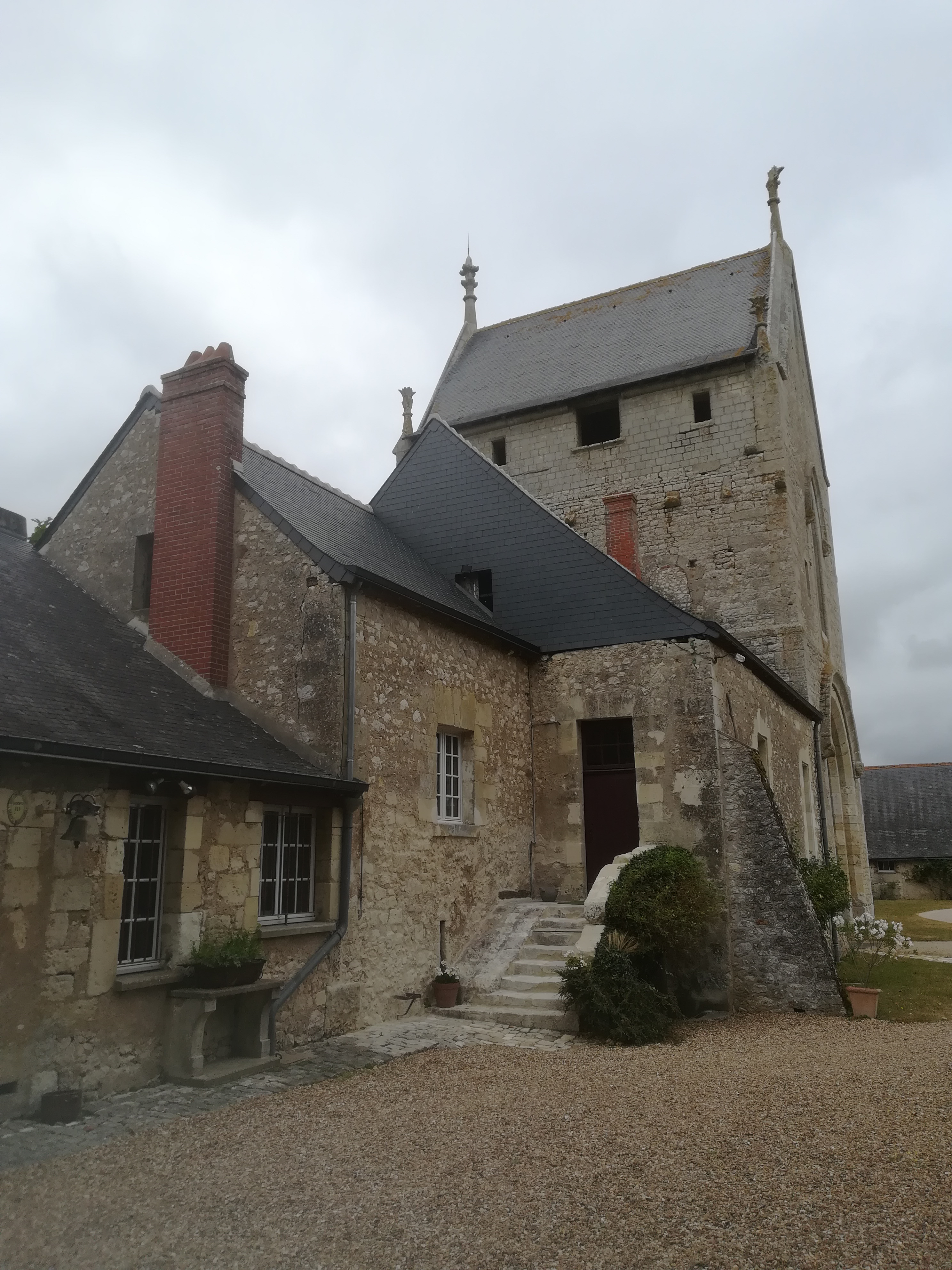 Vue, depuis la cour intérieure de la ferme fortifiée de Meslay, de la façade sud du portail d'entrée monumental et des bâtiments attenants ; le haut du portail sur cette façade a été refait récemment, d'où son altération manifeste.